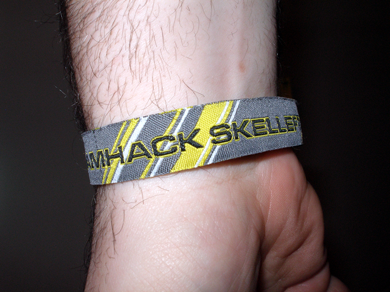 Passeringsarmband för Dreamhack Skellefteå. Misstålkigt! Tänk att det är en naken hårig kille jag bara varnar det ser konstigt ut.